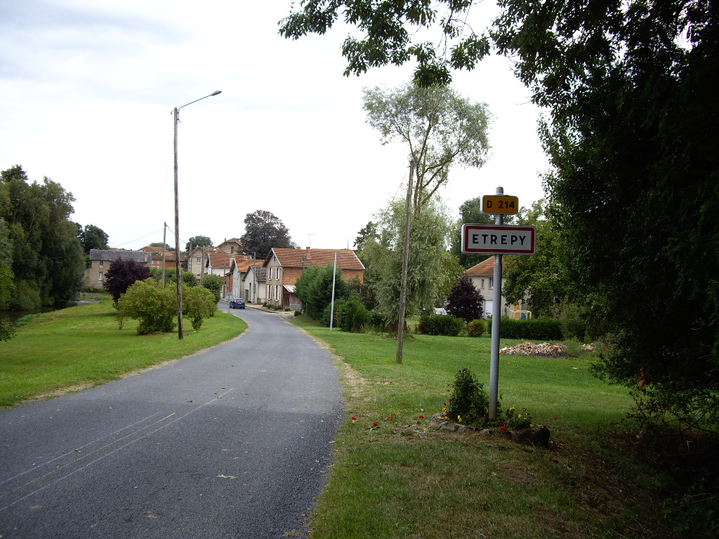 Etrepy, par le bas du pays.